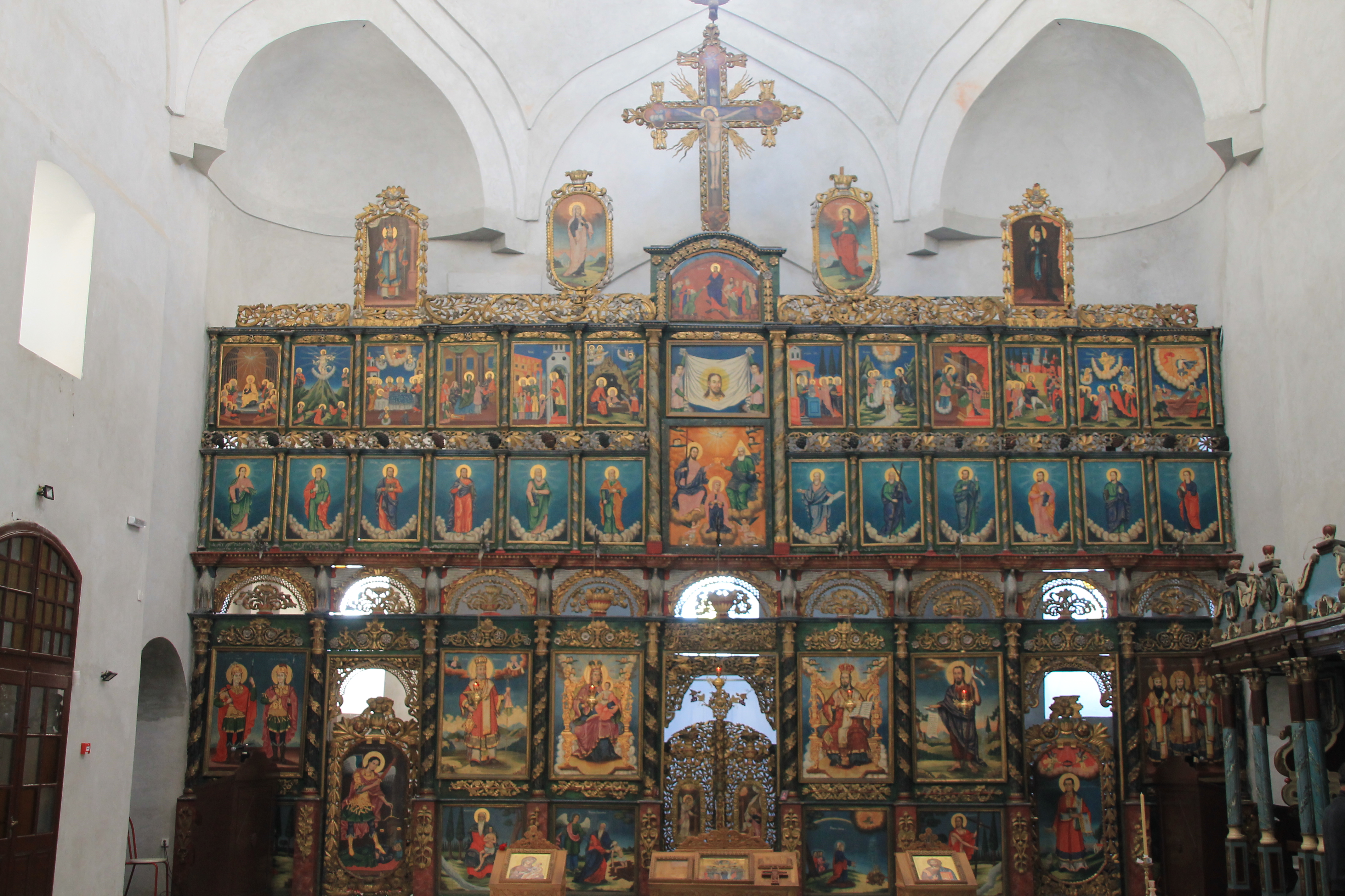 Crkva Vaznesenja Gospodnjeg (Čačak)